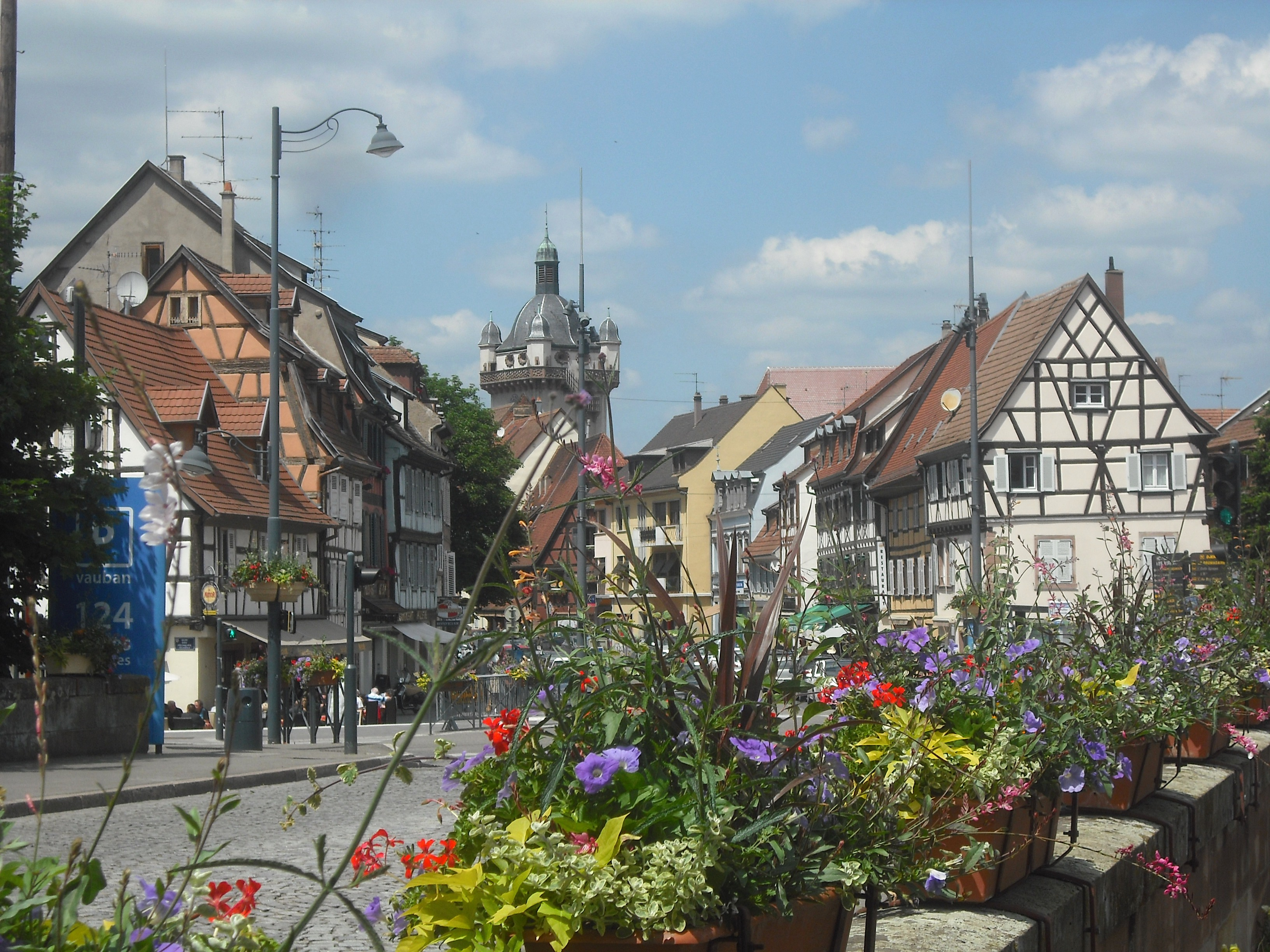 Pont sur l'Ill, Sélestat, Bas-Rhin, France.